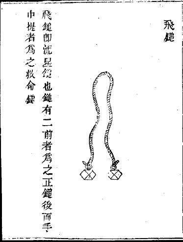 Китайское оружие "молот-метеор", иллюстрация из трактата Убэй чжи.